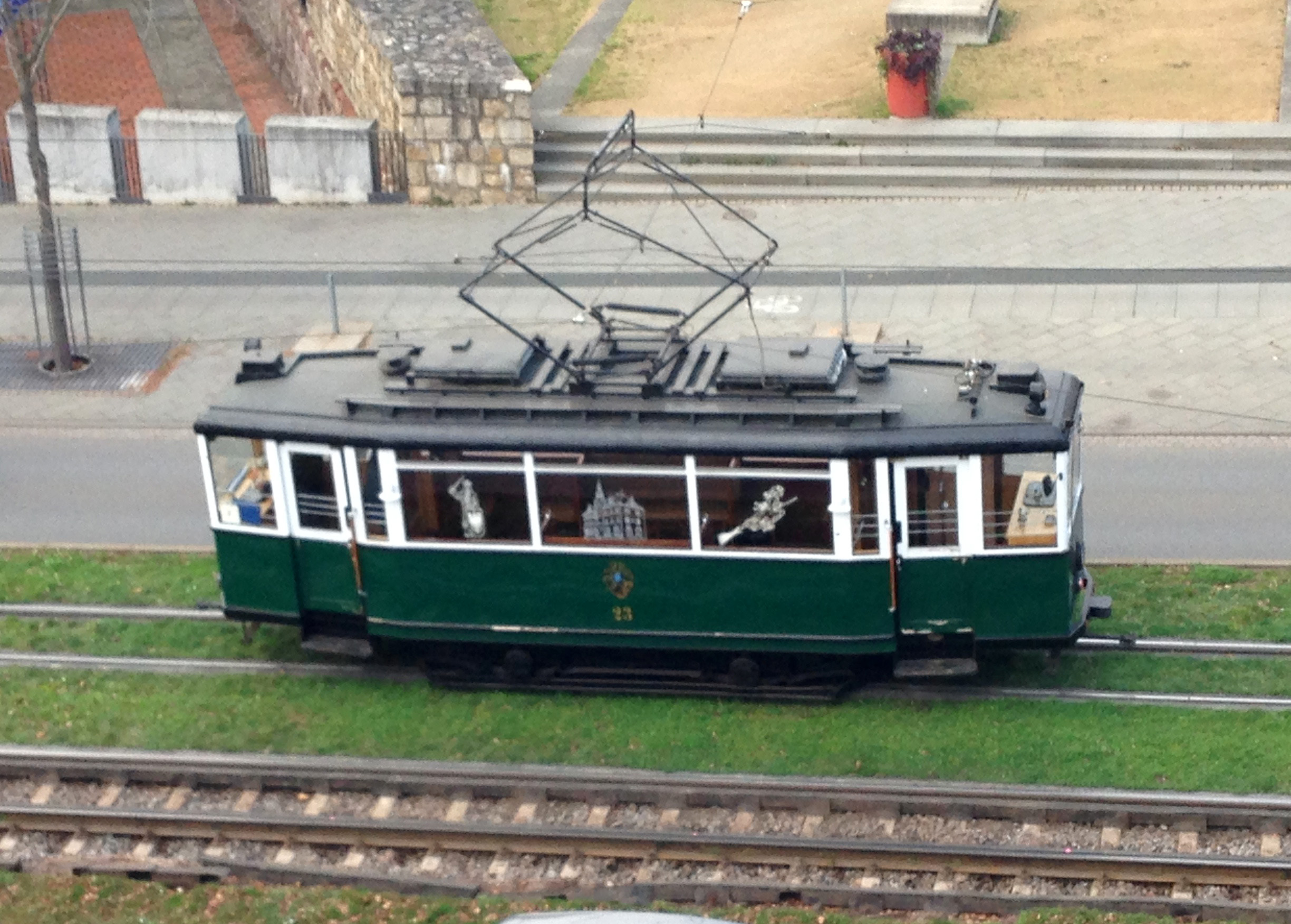 Historischer Triebwagen 23 in der Rautenstraße. Gebaut 1934 in Wismar.